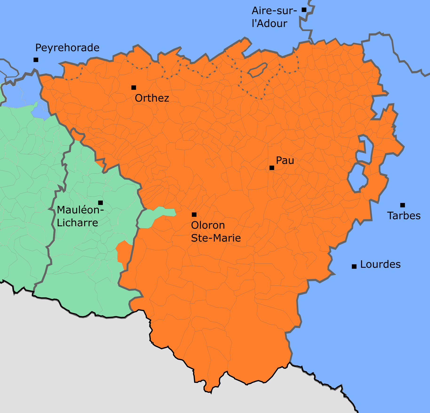 En rouge la zone béarnophone, en bleu la zone gasconophone, en vert la zone bascophone. Les tirets délimitent le Béarn historique du Béarn moderne, avec l'ajout d'une vingtaine de communes d'origine gasconne à la Révolution. Esquiule est une commune bascophone du Béarn, tandis que Lichos, Montory et Osserain-Rivareyte sont des communes souletines béarnophones.